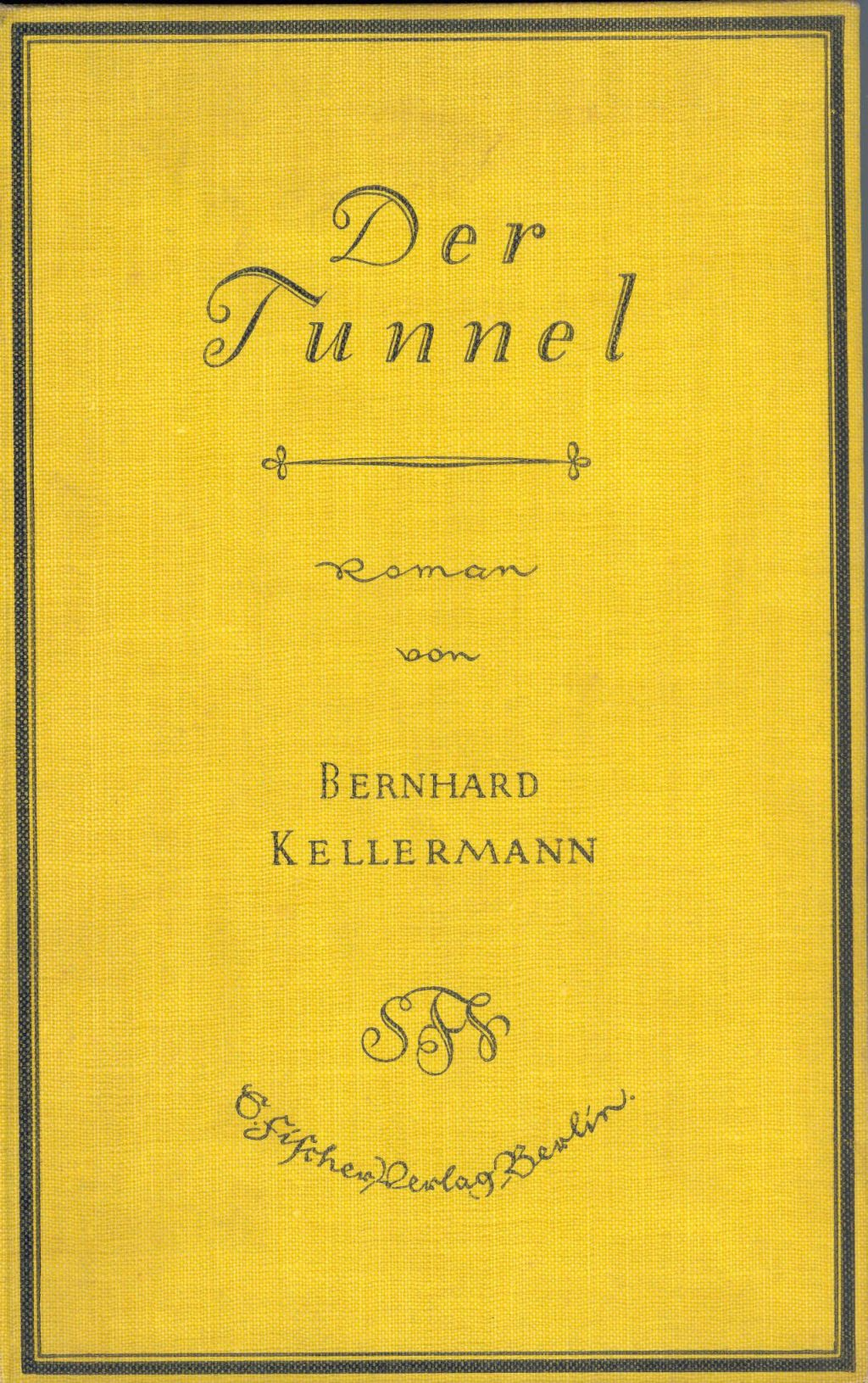 Kellermann: Deutsche Erstausgabe von "Der Tunnel" aus dem Jahre 1913. Selbst gescannt von Benutzer:Brunswyk.